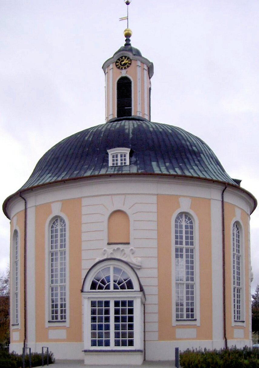 Berlischky-Pavillon (ehemalige Französisch-reformierte Kirche) in Schwedt/Oder, Brandenburg, Deutschland